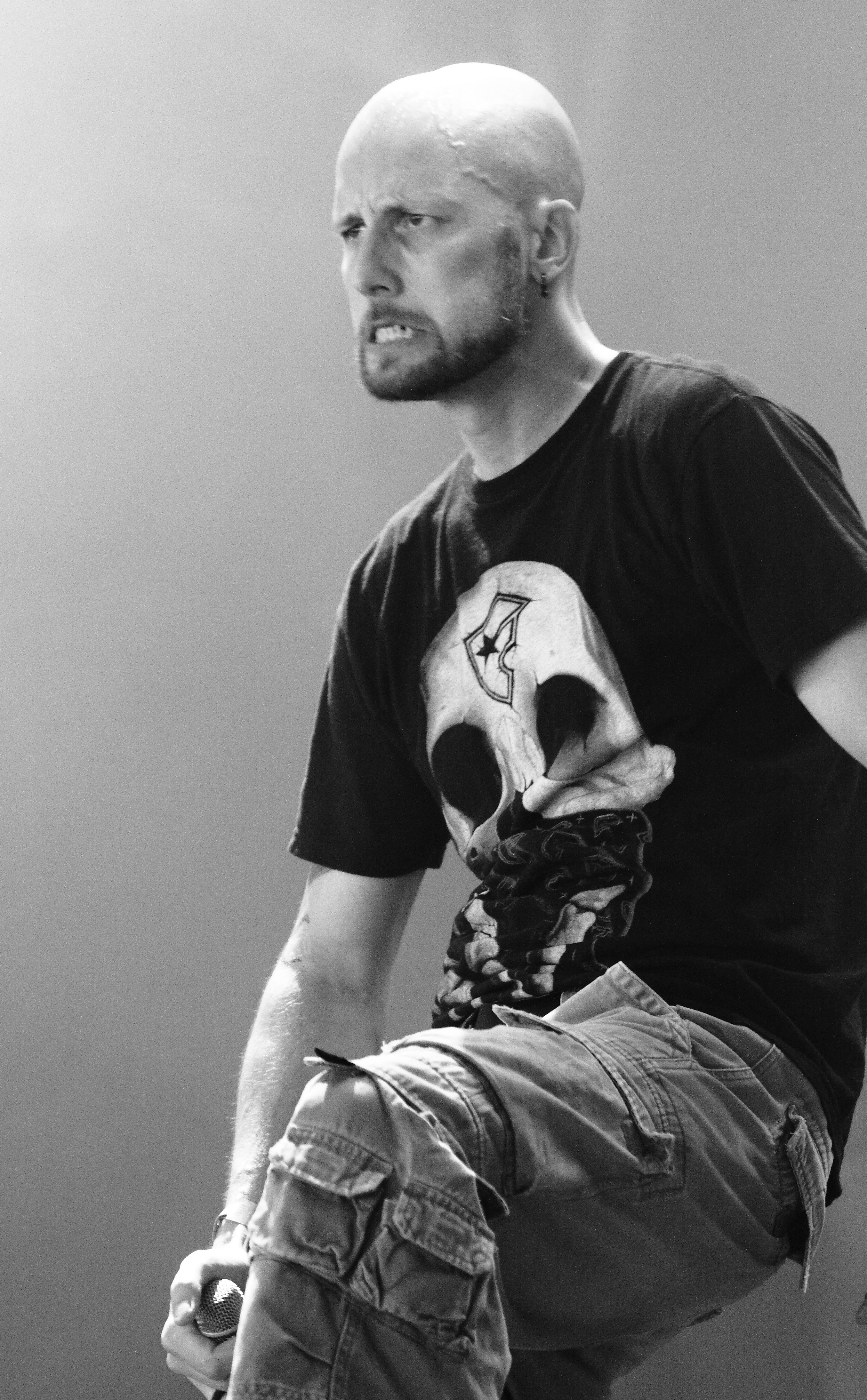 Meshuggah@ rosklide festival